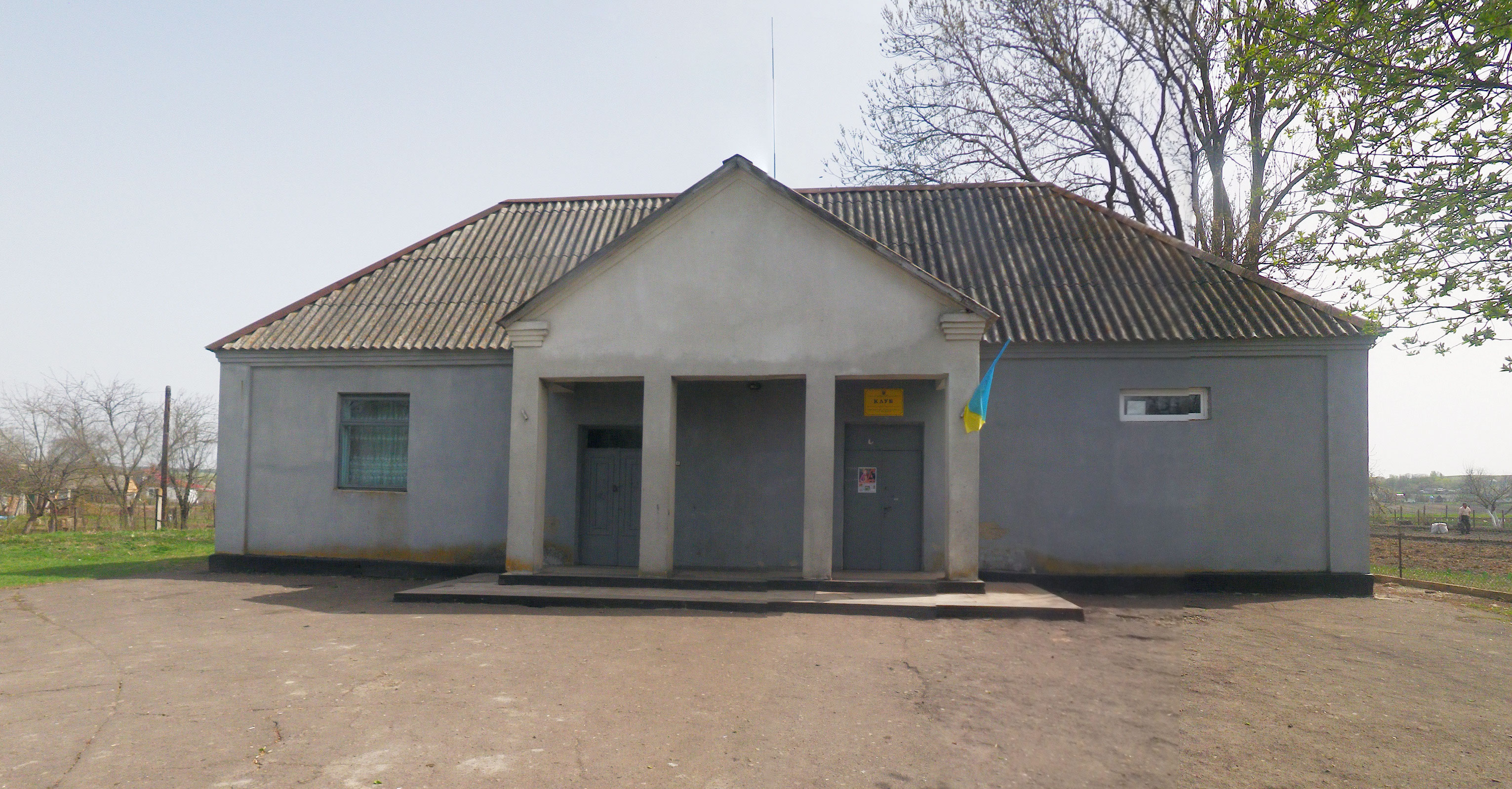 с. Старожуків, клуб